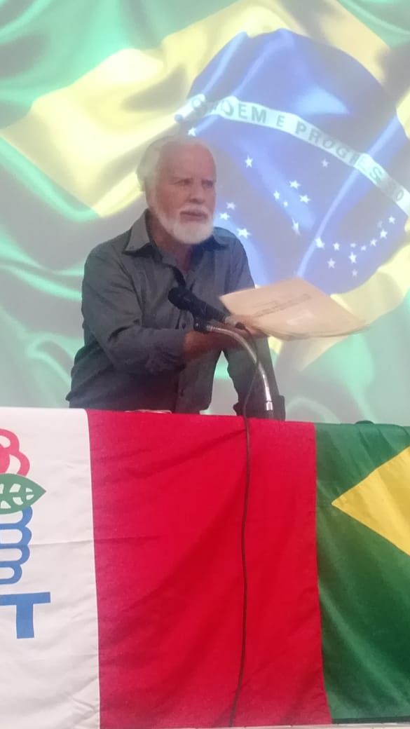 Nesta palestra, Magnus conta sua trajetória como militante histórico do partido, signatário da Carta de Lisboa e qual o papel do jovem no momento político brasileiro de 2019.